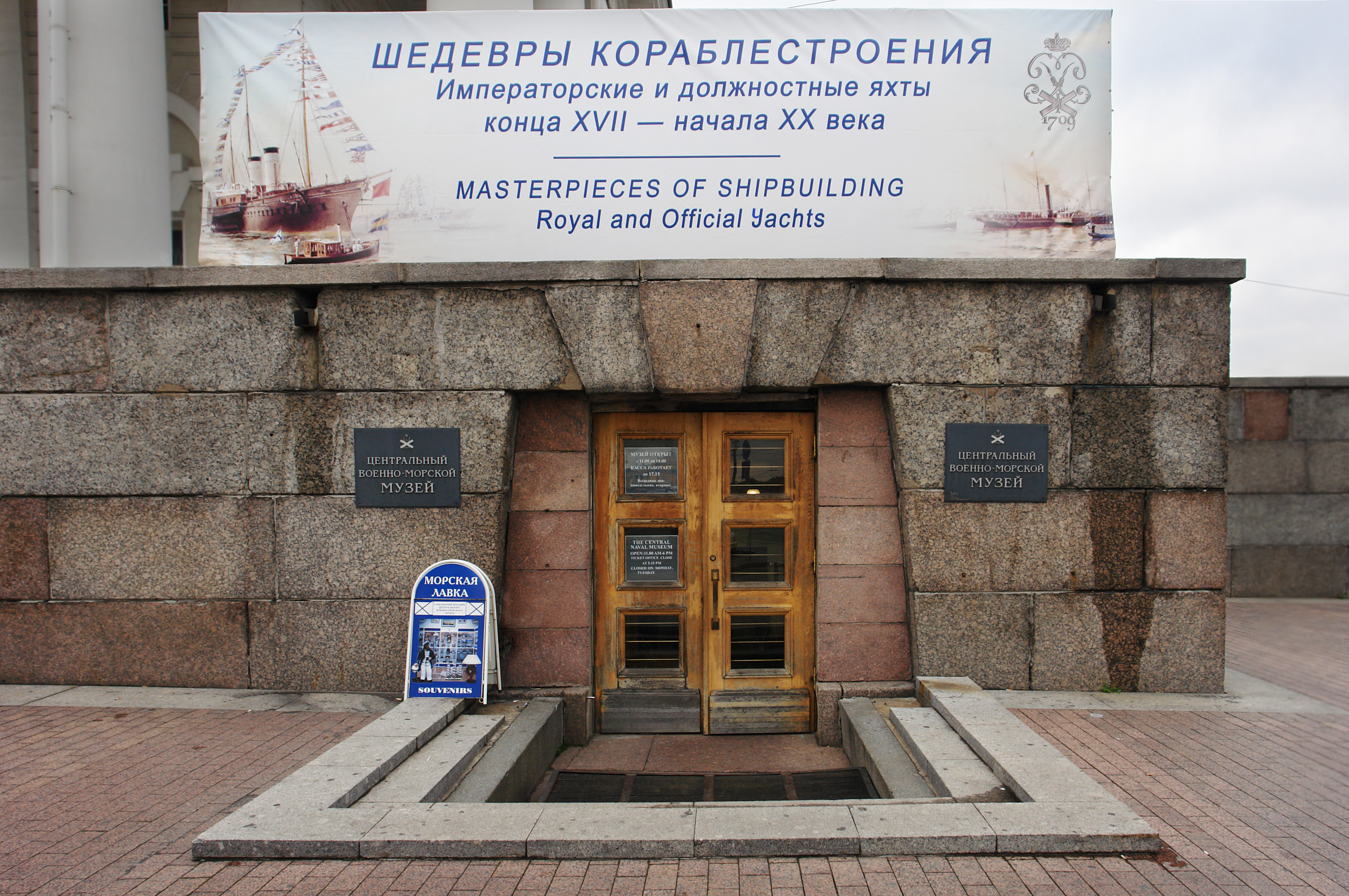 Вход в центральный Военно-Морской музей, Санкт-Петербург. Entrance to the Central Naval Museum, Saint Petersburg.